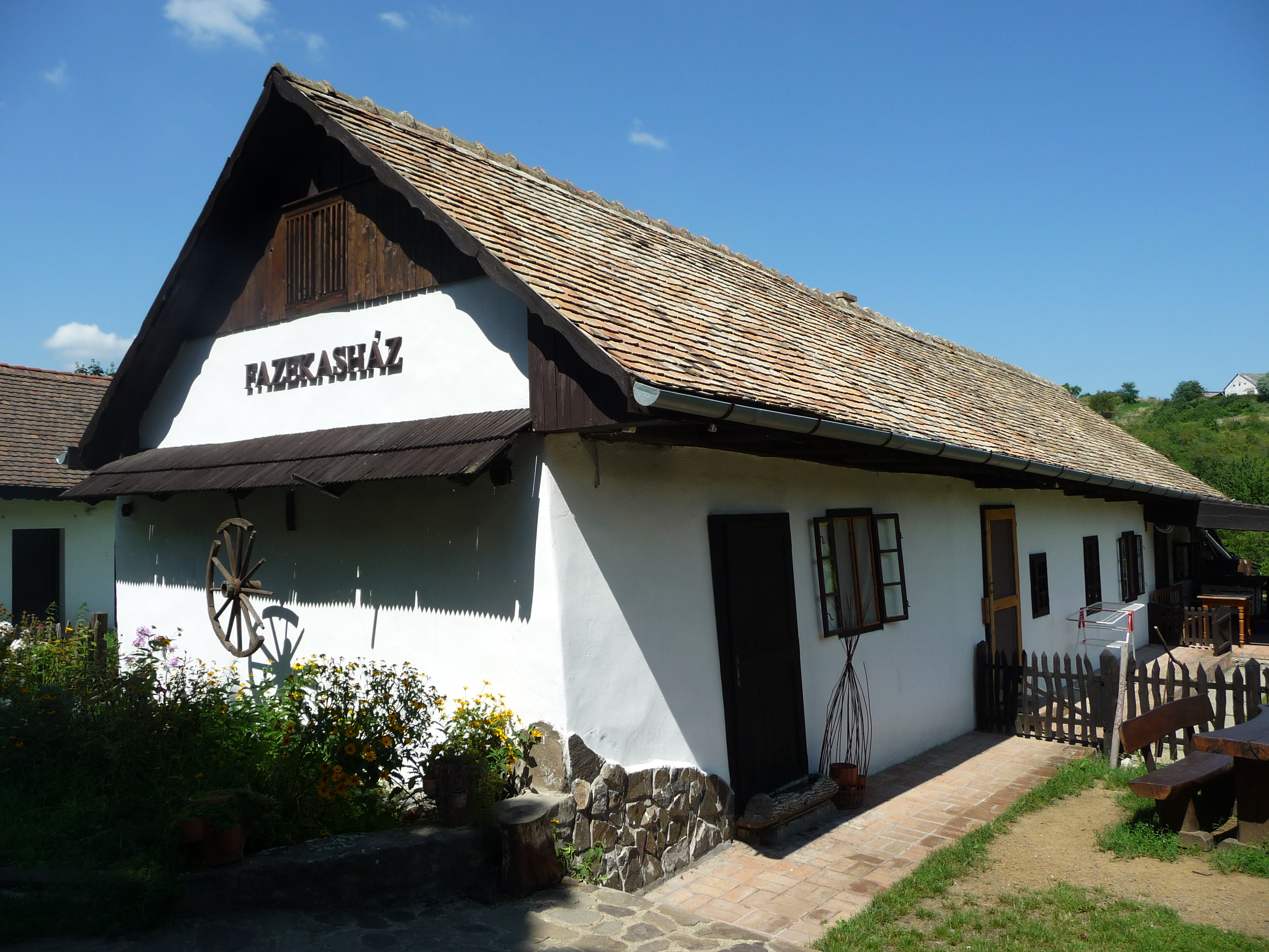 Hollókő, Fazekasház